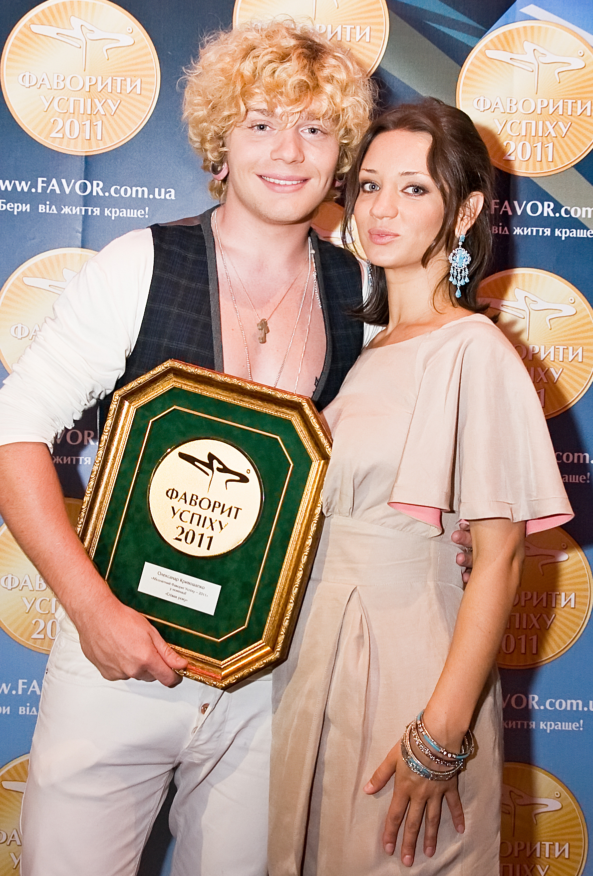 Александр Кривошапко с супругой Татьяной Денисовой на церемонии вручения наград победителям конкурса «Фавориты Успеха – 2011». Александр — Фаворит в номинации «Певец года – 2011»